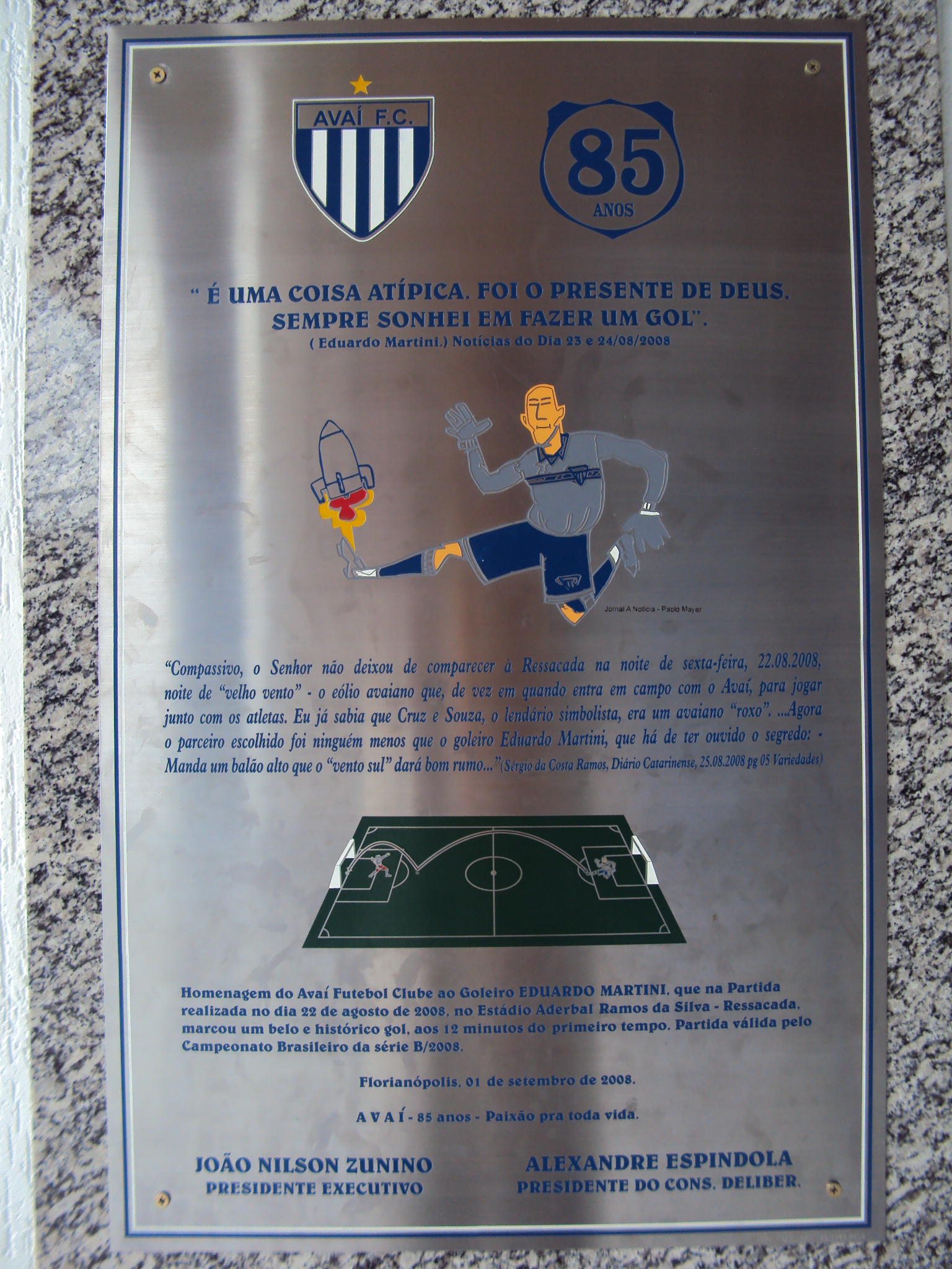 Placa comemorativa ao gol de Eduardo Martini.